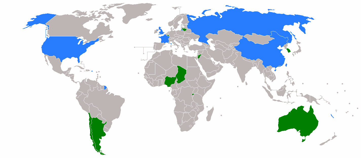 UNSC 2014